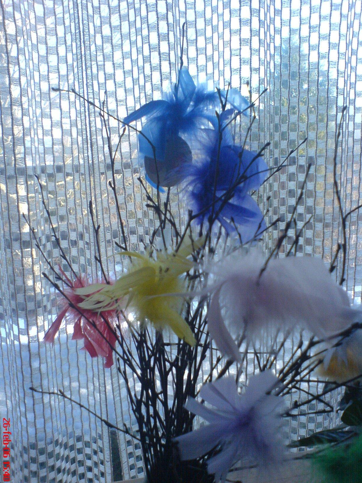 Dette er min fastelaven-ris dette året. Bruker:Marcus har laget denne, han er kul. Neida... Hehe. Må dette være meget seriøst? Laget av meg selv med k750i på fastelavenssøndag 2006. This is a "flower" used in a tradition in the Christianity, I don't know exactly how to translate this...